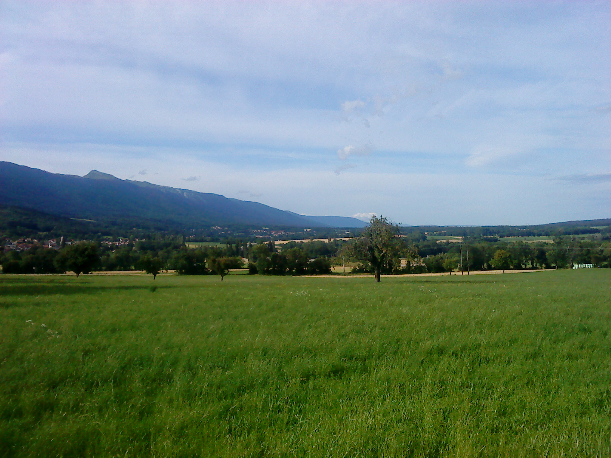 Le pays de Gex vu du sud, avec à l'ouest les Monts Jura